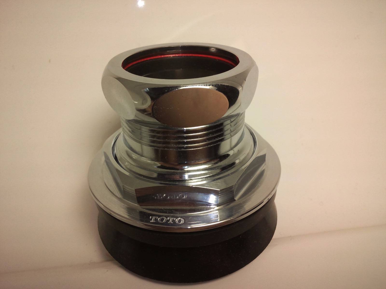 スパッド部